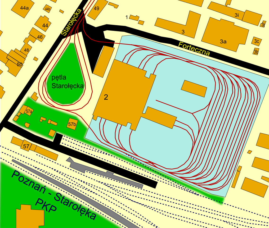 Zajezdnia S3 Forteczna Poznań; ul. Starołęcka, Forteczna, PKP Poznań-Starołęka